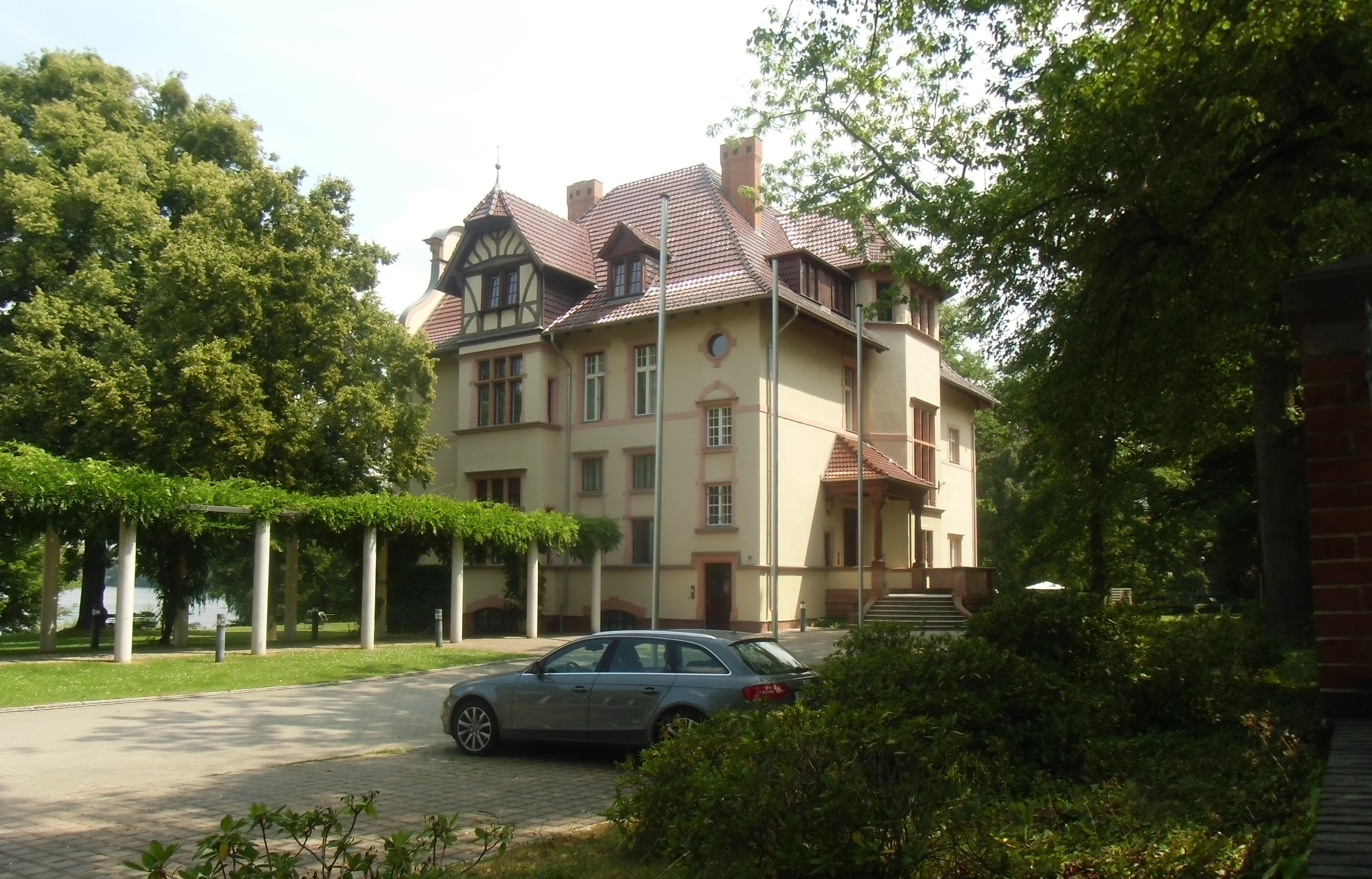 Villa Müller-Grote & Truman-Villa, denkmalgeschützte Villa in Potsdam-Griebnitzsee, erbaut 1891-1892 von den Architekten Karl von Groszheim und Heinrich Joseph Kayser für den Buchhändler und Verleger Carl Müller-Grote; während der Potsdamer Konferenz Sitz des amerikanischen Präsidenten Harry S. Truman, auch "Little White House" genannt. Seit 2001 im Besitz der Friedrich-Naumann-Stiftung.